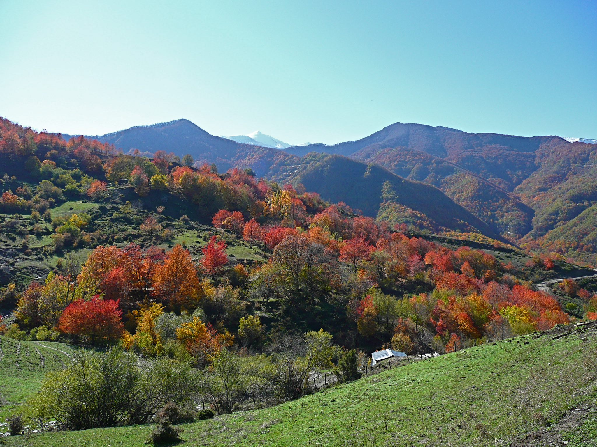 In Explore, Highest position: 79 on Monday, November 5, 2007 Finalmente una bella giornata dopo 3 settimane di pioggia. Parco nazionale del Gran Sasso e Monti della Laga